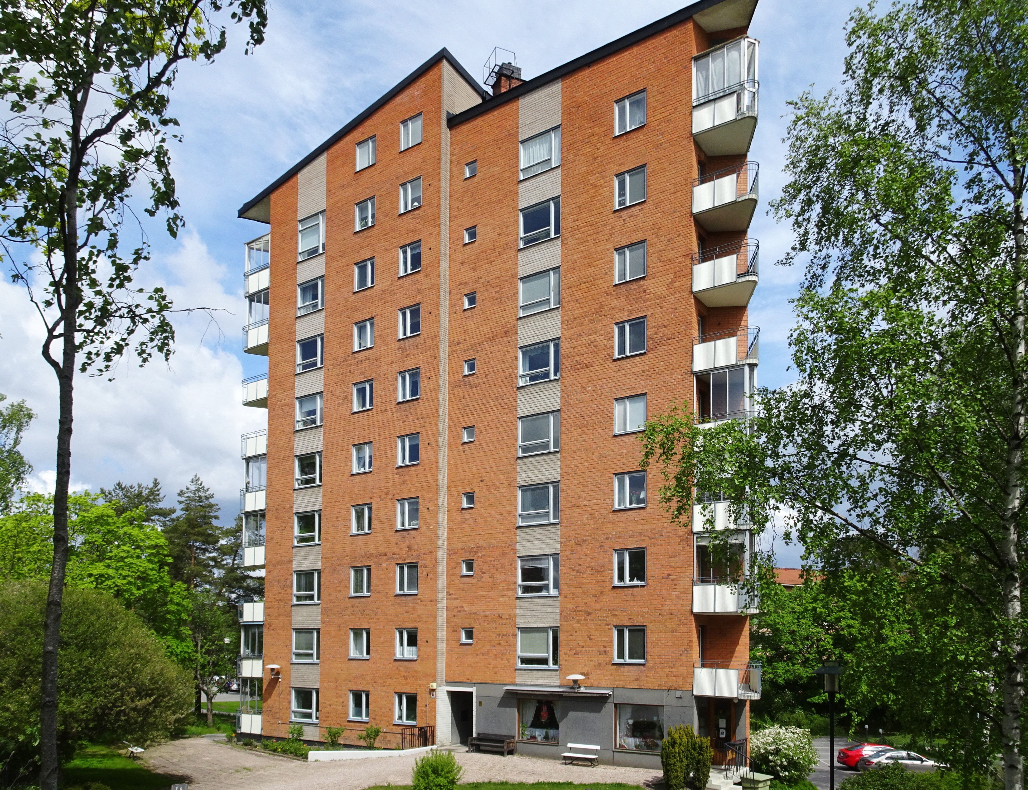 "Triangelhuset", Fruängen, Ellen Keys gata 37, byggår 1955. Bygg-Oleba, Olle Engkvist AB (Byggmästare) Bygg-Oleba, Olle Engkvist AB (Byggherre) Håkansson (Trädgårdsarkitekt) Werner Taesler (Arkitekt)